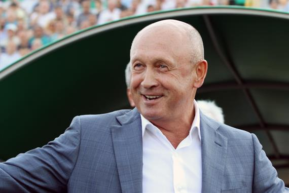 Микола Павлов — український тренер маріупольського «Іллічівця»